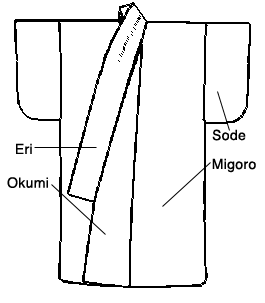 Kosode ja/tai kimono Parts of a Kosode.